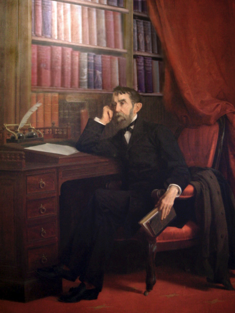 Rafael Núñez Moledo Presidente de Colombia (1880-1882) (1884-1886) (1887-1888) .